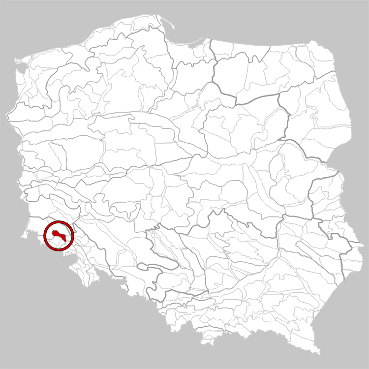 Physico-geographical regionalization of Poland Mezoregion 332.35 Kaczawa Mountains Regionalizacja fizycznogeograficzna Polski Mezoregion 332.35 Góry Kaczawskie